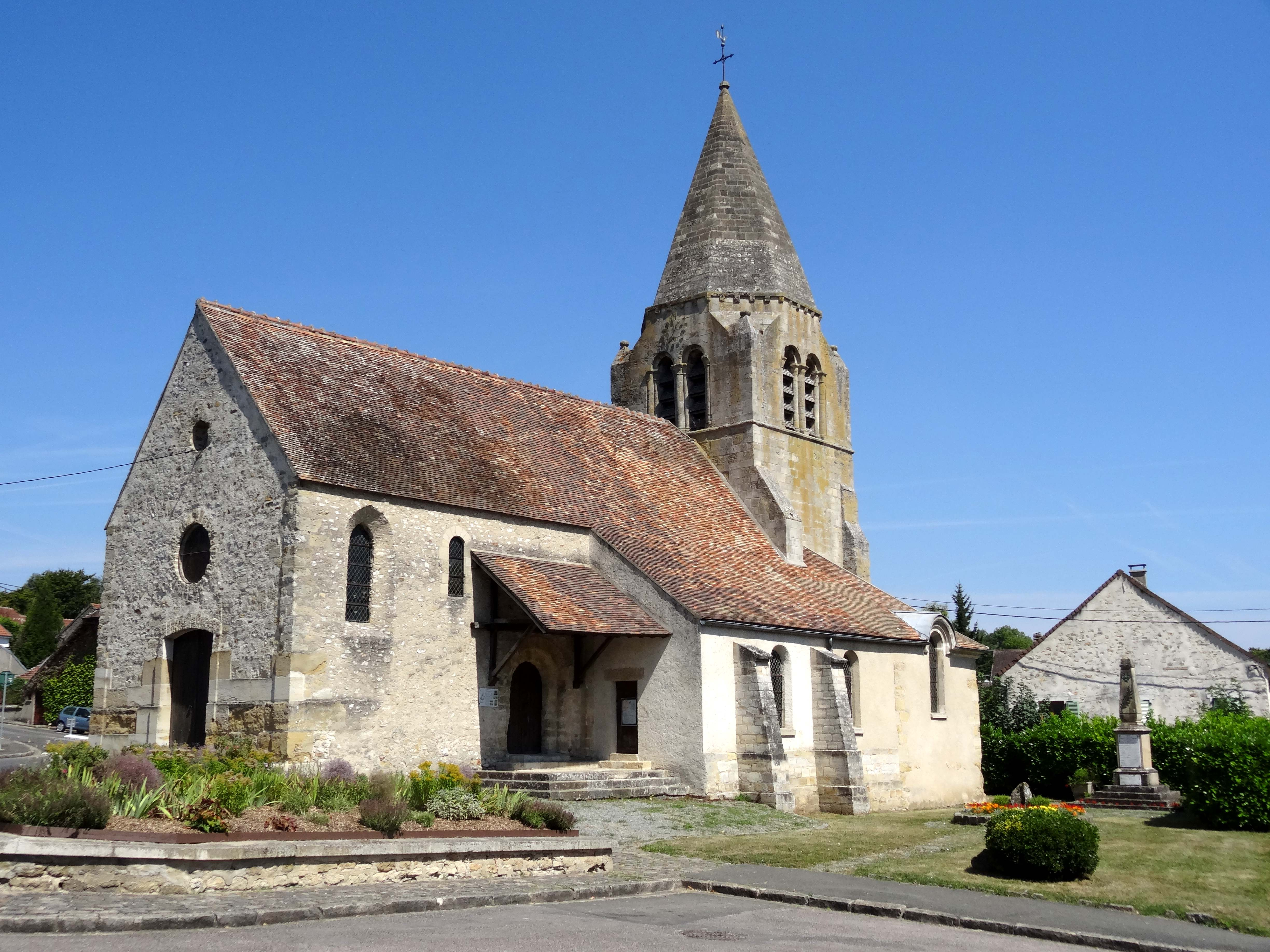 Église Saint-Nicolas de Tessancourt-sur-Aubette - voir titre.